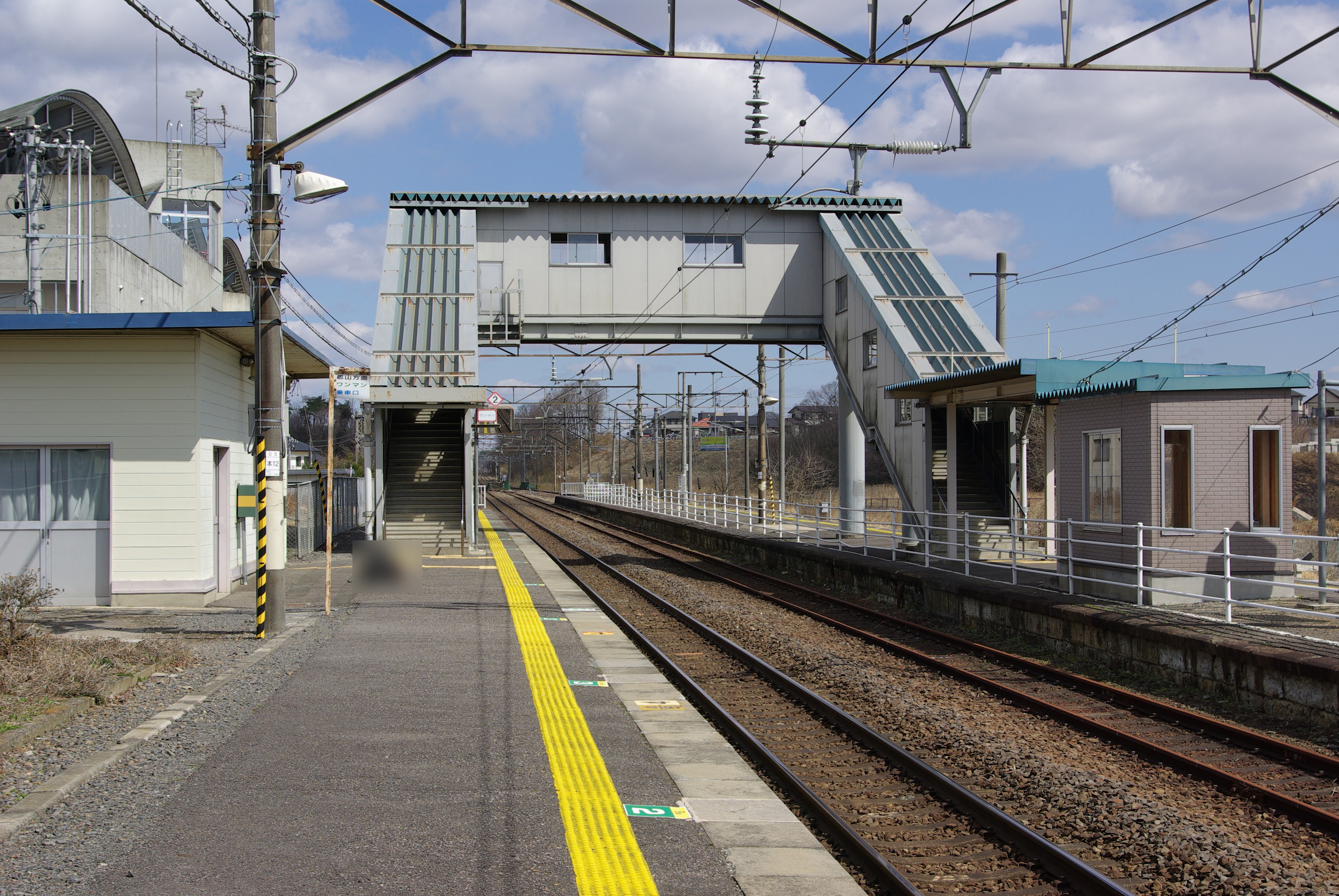 東北本線泉崎駅